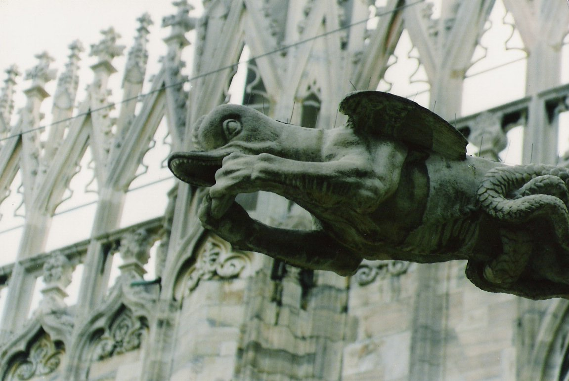 Catedral de Milán